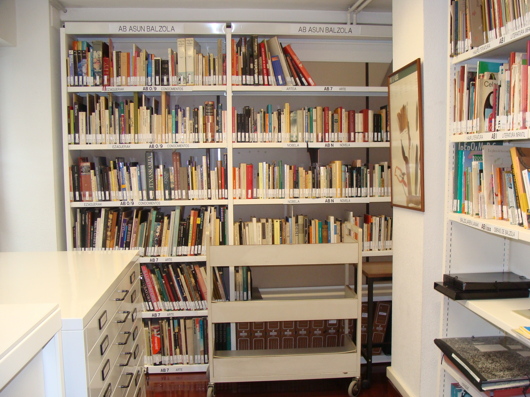 Asun Balzola (1942-2006) idazle eta irudigileren Dohaintza